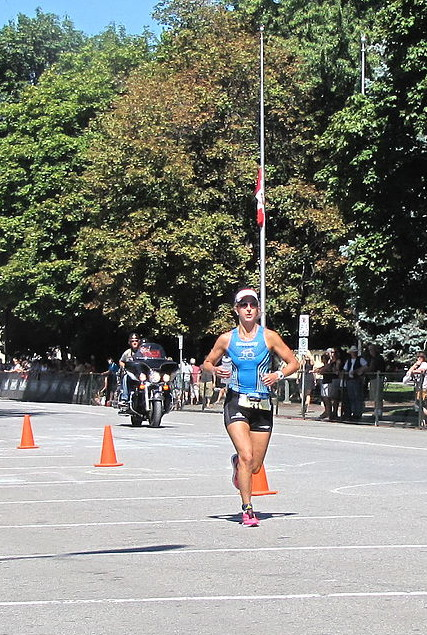 Meredith Kessler sur l' Ironman de Penticton en 2011